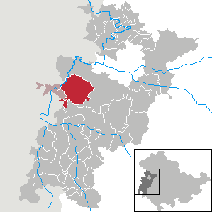 Berka/Werra in Thuringia - Wartburgkreis